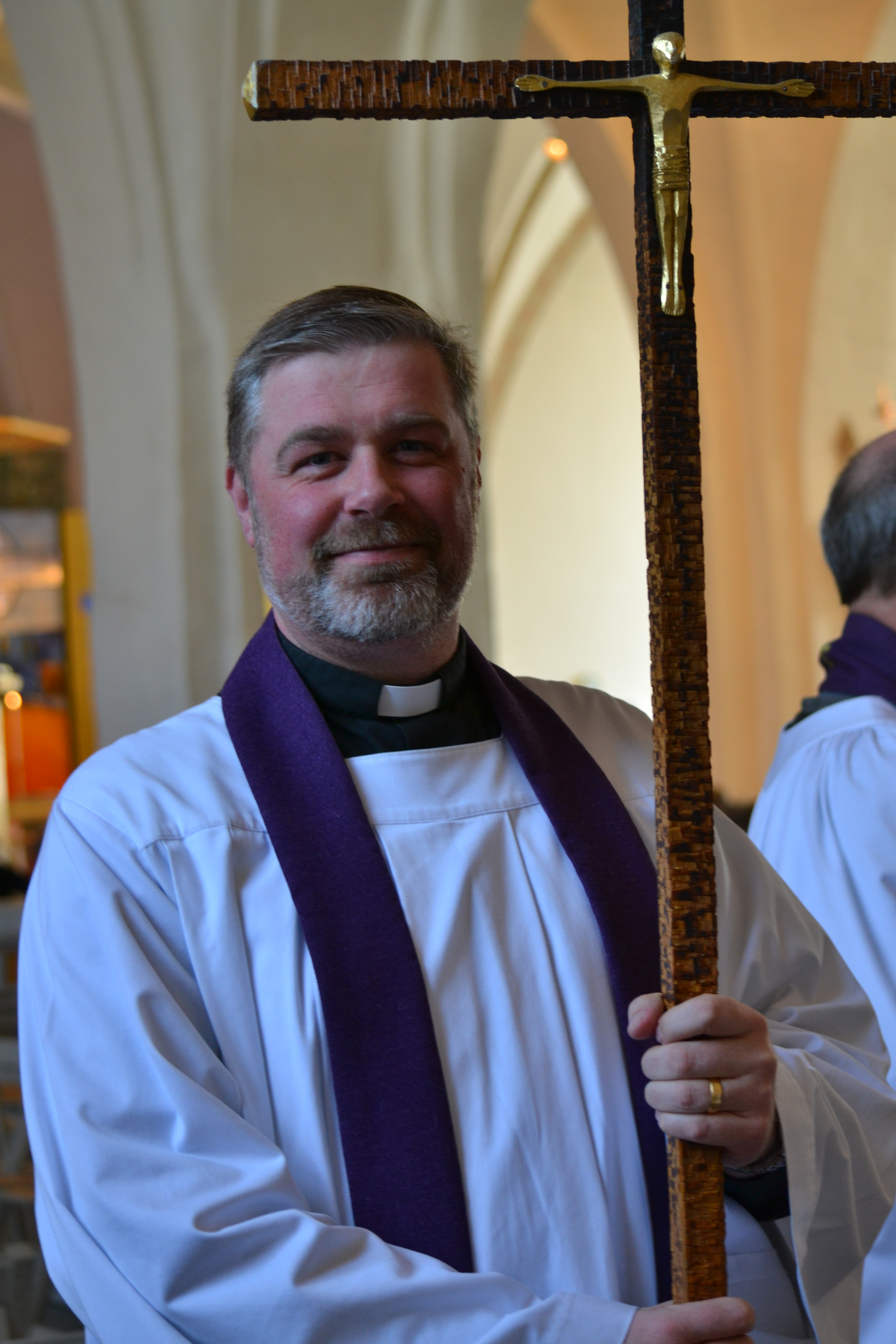 Domprost Thomas Petersson, Växjö domkyrka